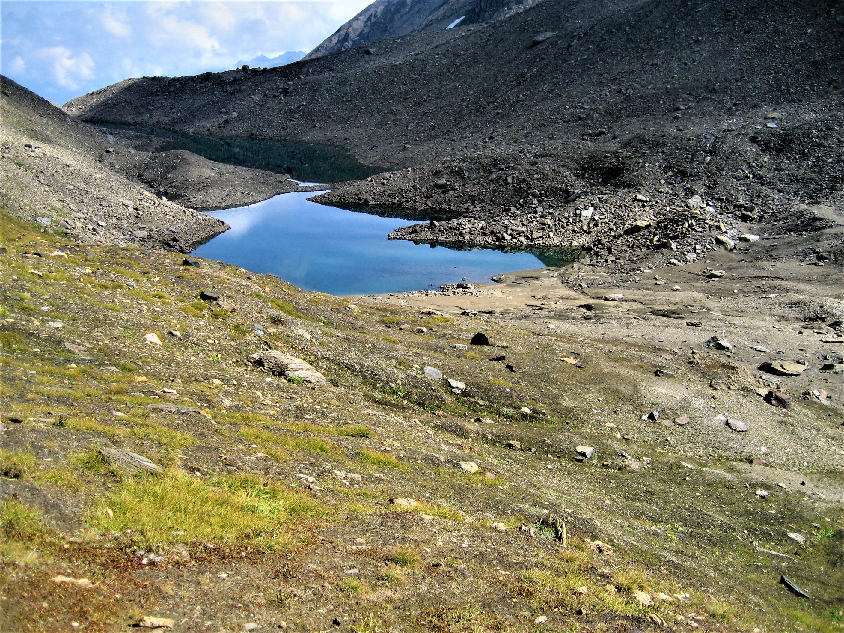 Berglandschaft